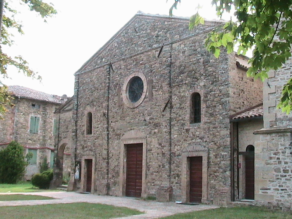 Bazzano (Neviano degli Arduini) - Pieve romanica di Sant'Ambrogio